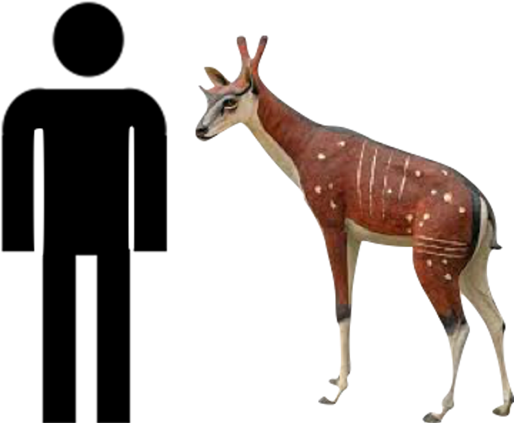 Grandezza di un Ampelomeryx rispetto a quella di un umano medio.